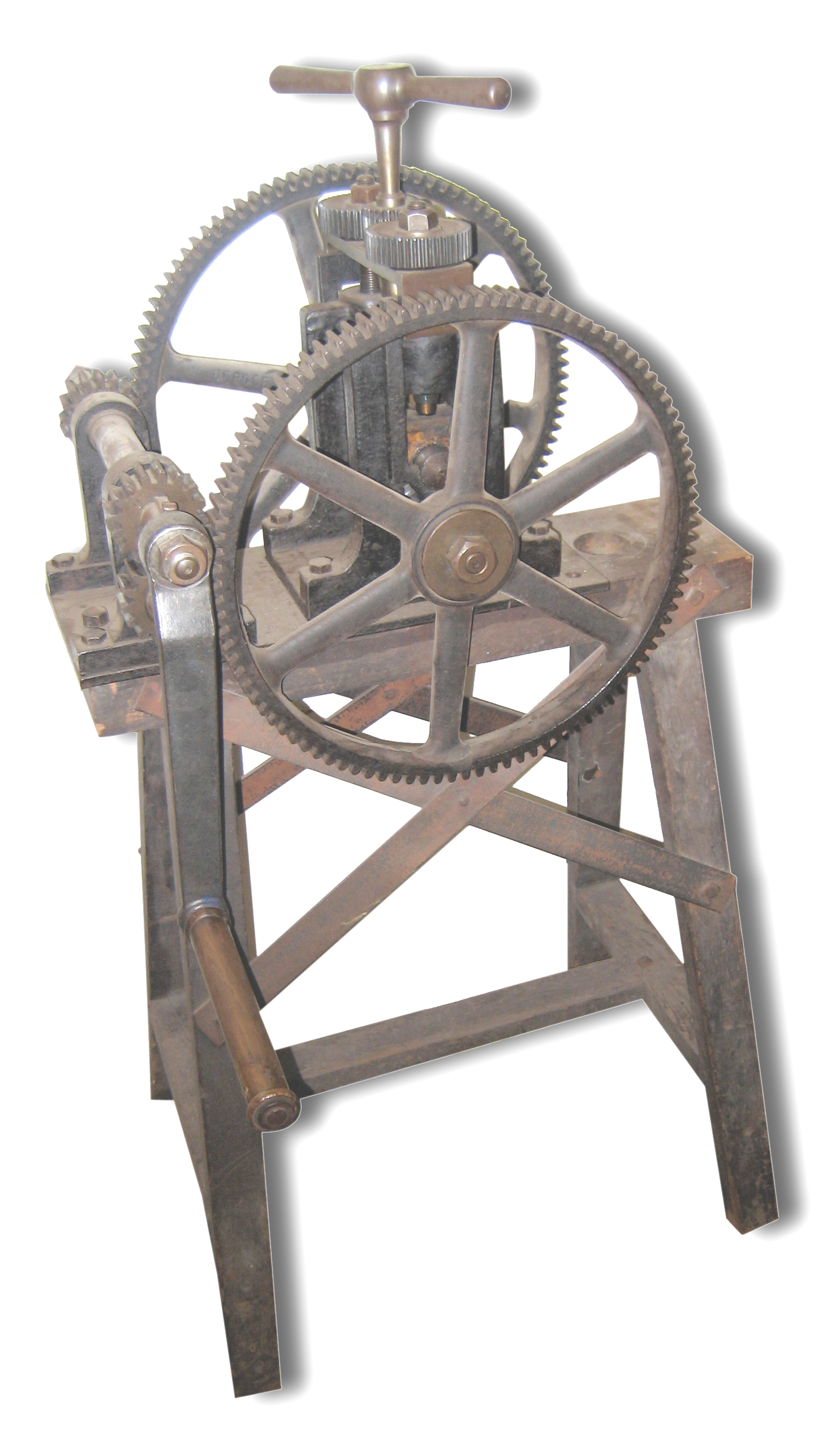 Laminoir à plaques, outil de bijoutier source : l'Or de Vaise / photo : Dominique grassigli